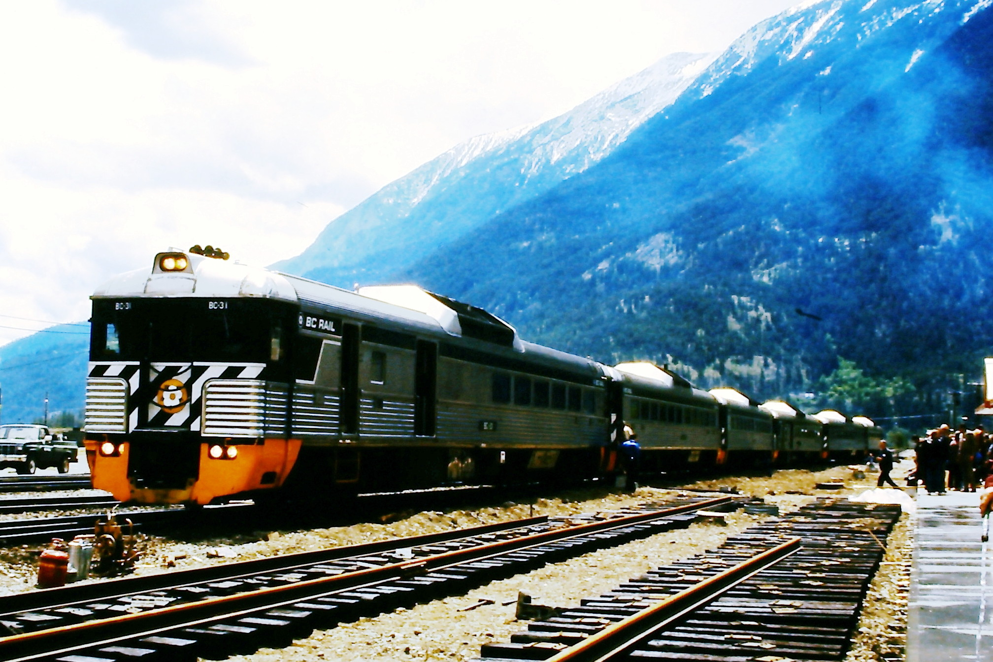 Cariboo Dayliner von BCR in Lillooet